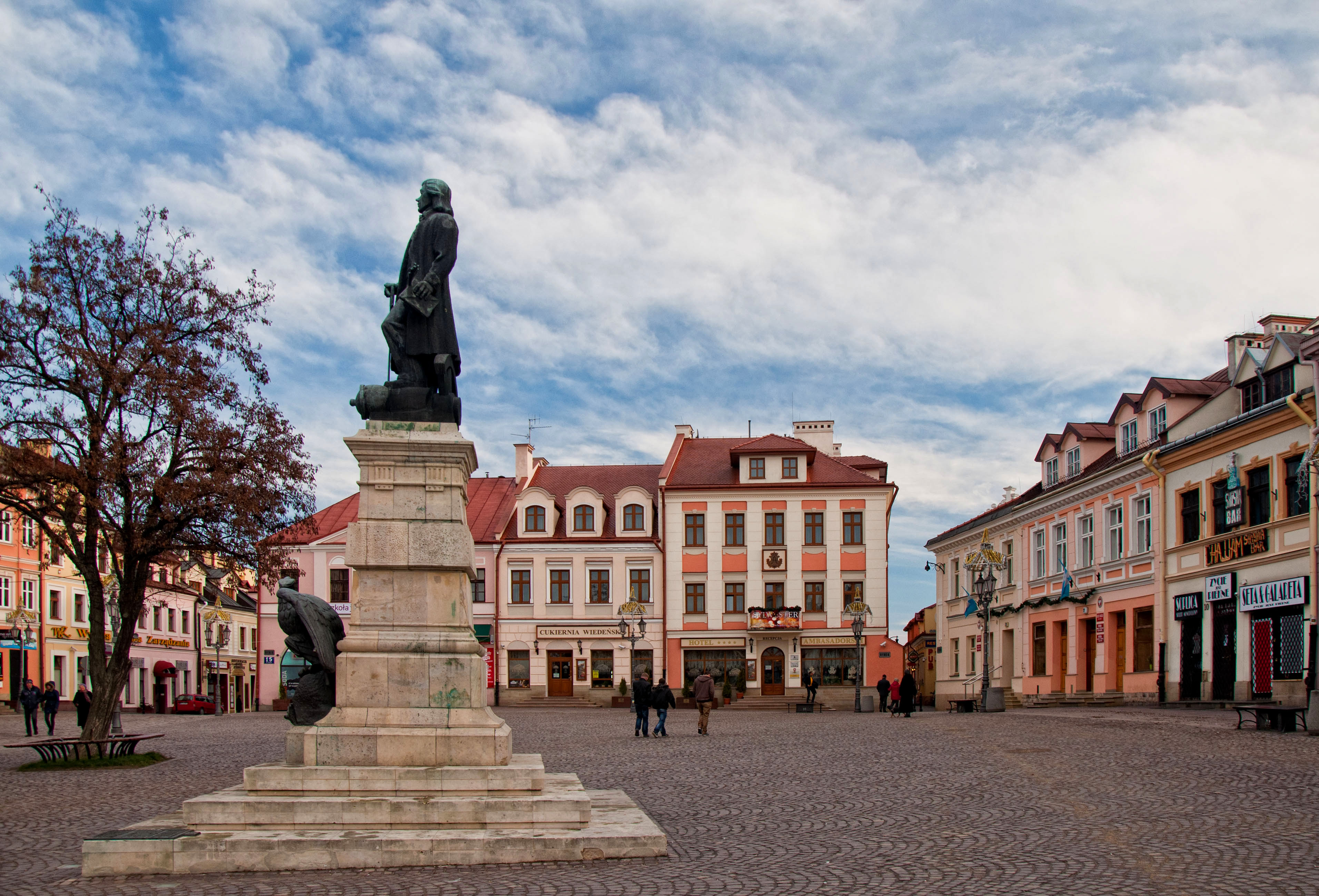 Rzeszów, zespół urbanistyczny średniowiecznego miasta i nowego miasta, 1354, XVIII, XX